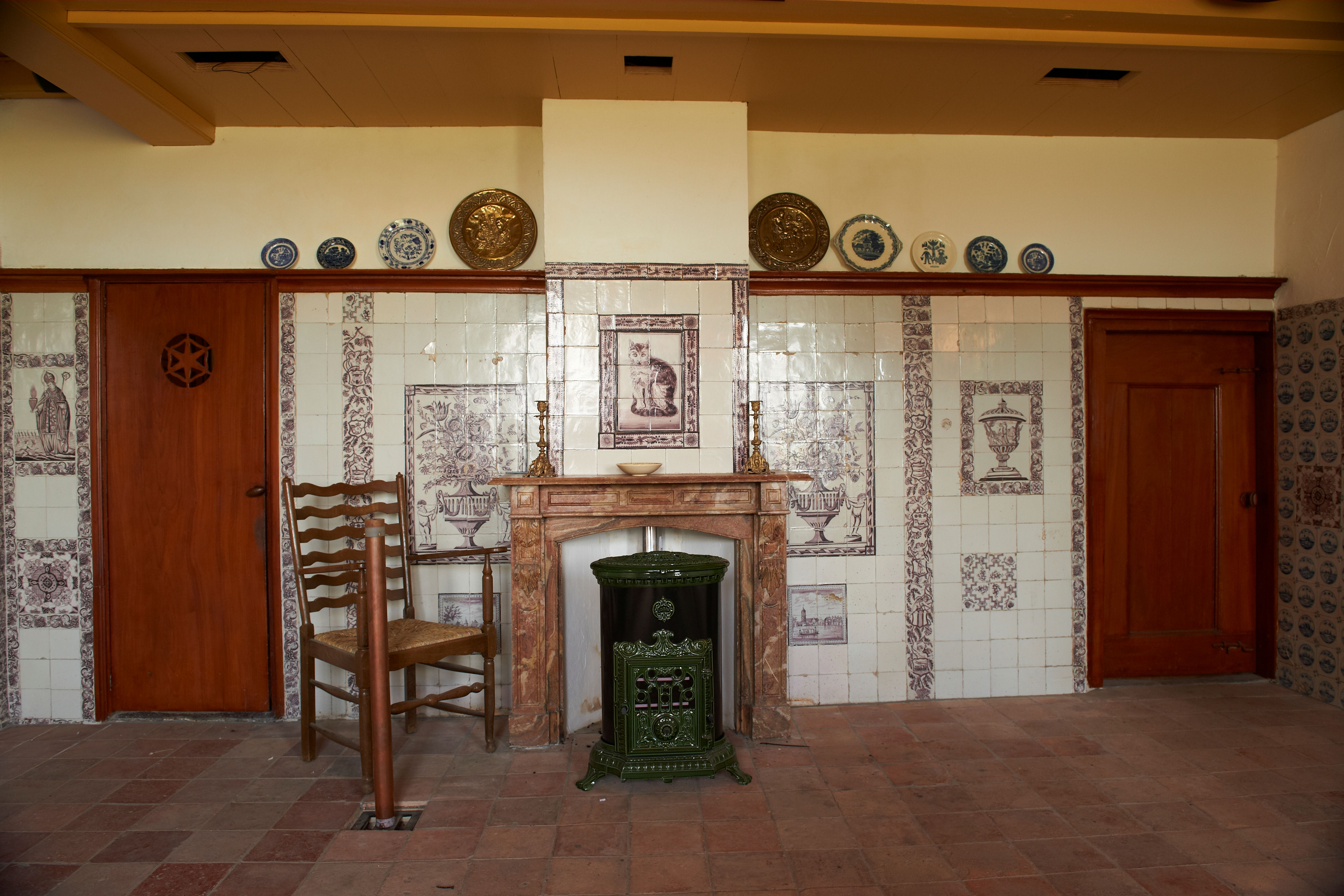 De heerd anere zijde met de tegeltableau's van historische waarde